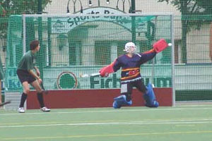 Szene aus einem Feldhockeyspiel in Deutschland